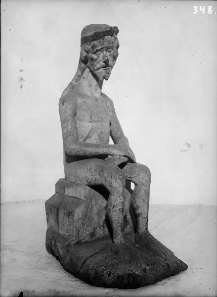 Kristusbild av ek, 1400-tal. Kategori: (05) SkulpturerKristusbild av ek, 1400-tal.